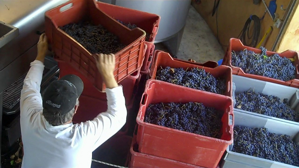 Vendange en petites caisses pour préserver l'intégralité des grains de raisins